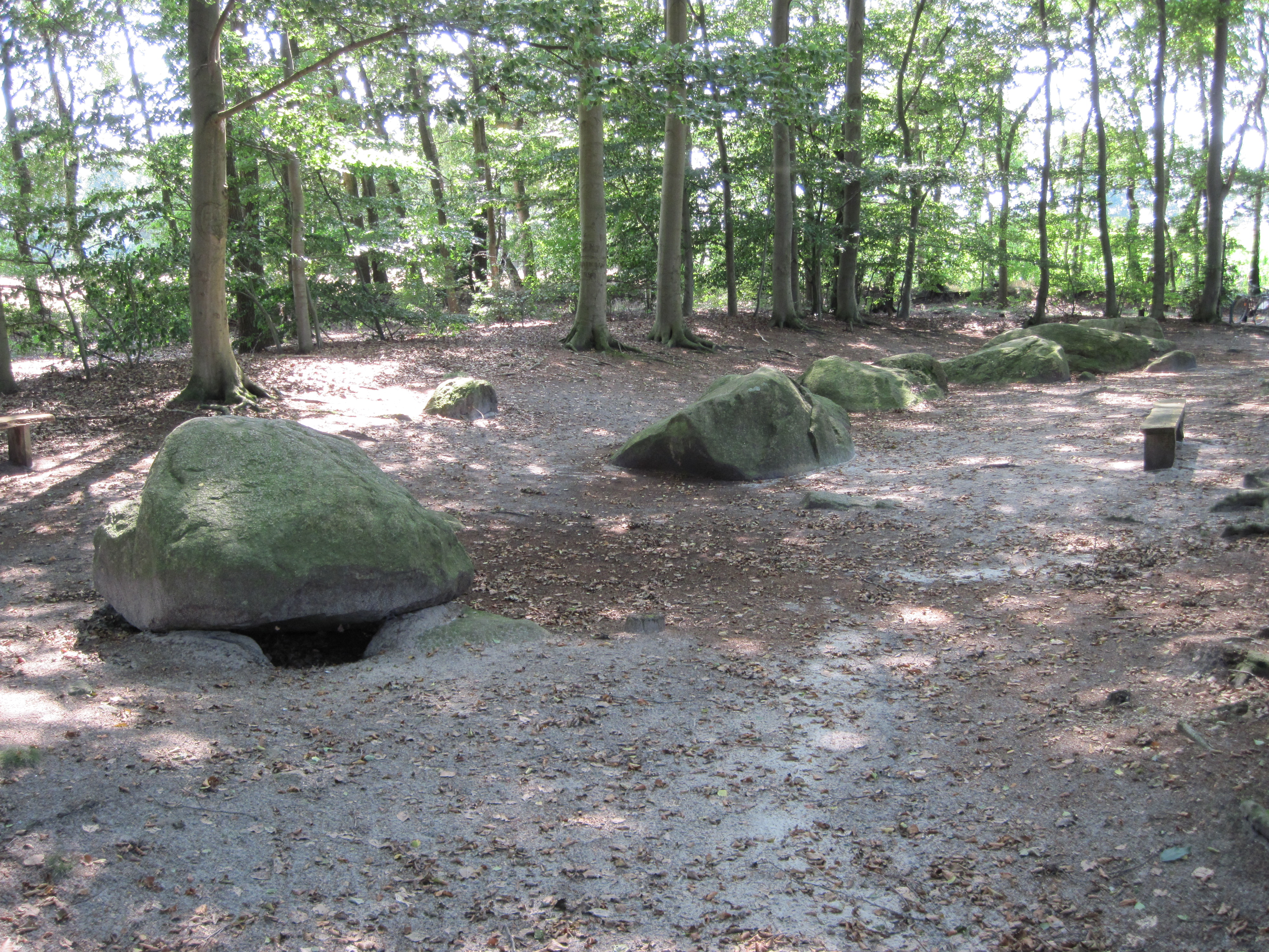 Großsteingrab (Schlingsteine) in Lindern (Oldenburg), Herrensand.